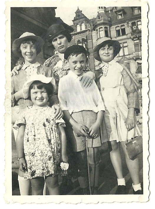 משפחת ארנרייך ויסבאדן 1934